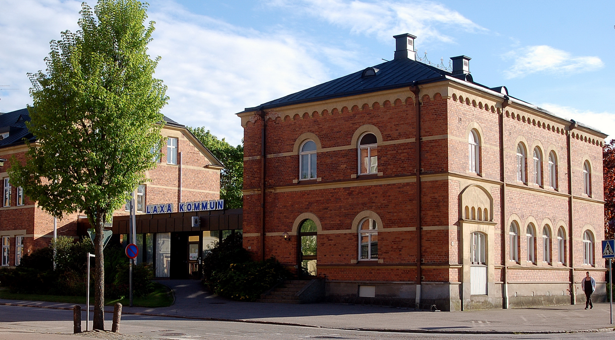 Kommunhuset i Laxå, Sverige. Huset uppfördes 1900 i bottenvåningen fanns postkontor, medan den övre våningen hyste en postmästarebostad. Numera kommunhus. City hall Laxå, Sweden